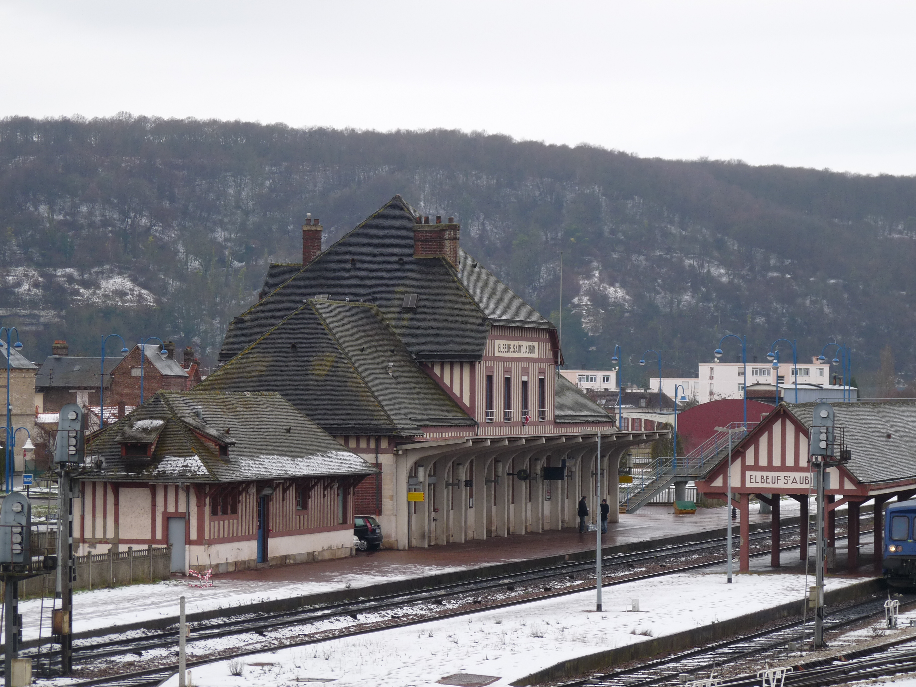 Gare de St Aubin-les-Elbeuf.76 Seine Maritime_